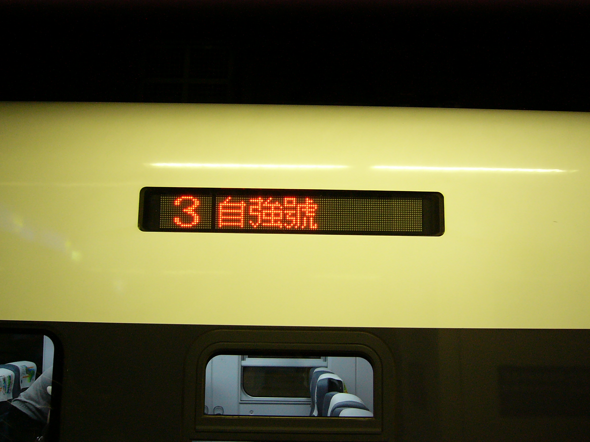 台鐵TEMU1000型電聯車車外LED顯示器。